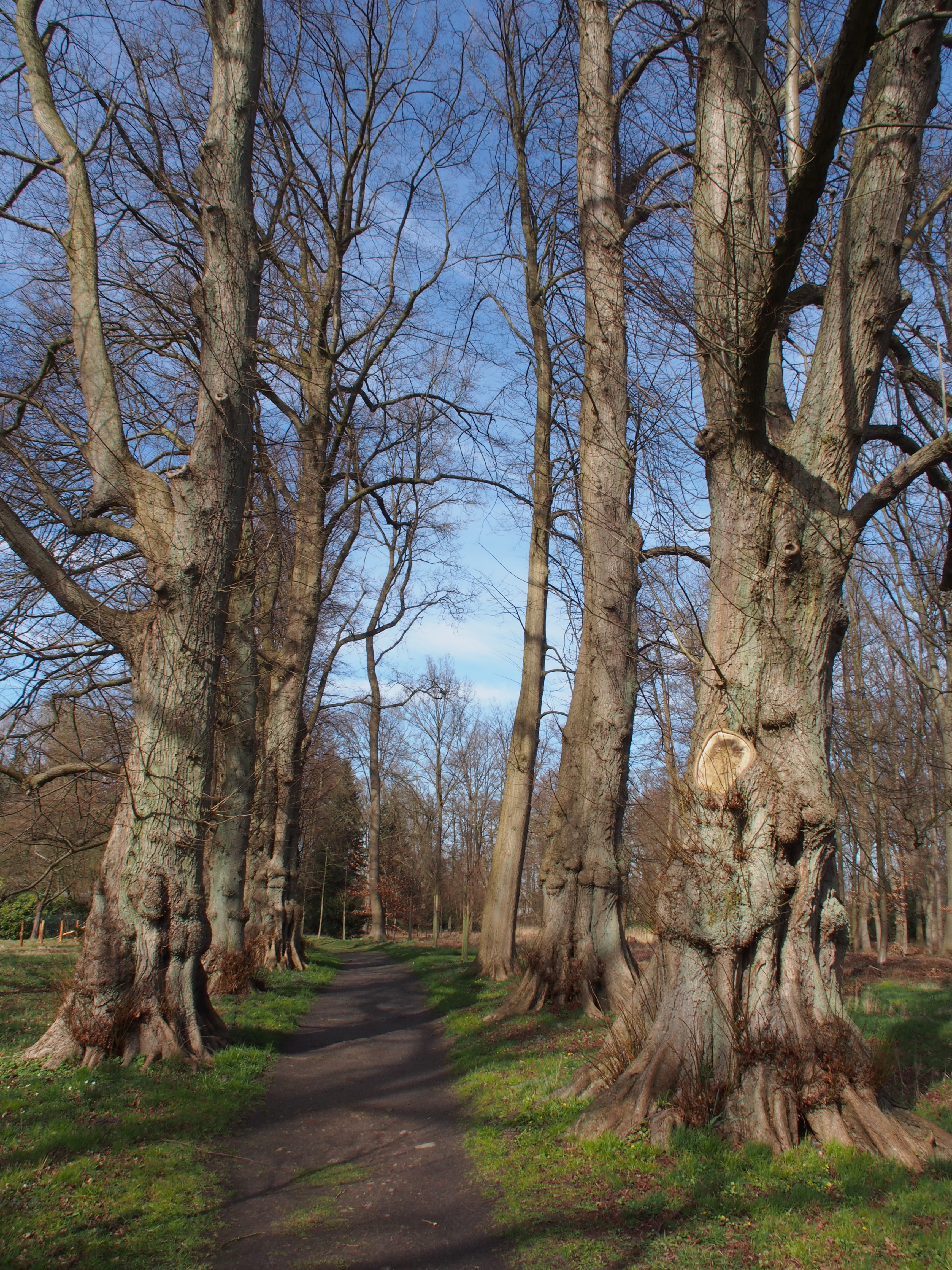 Breidings Garten (Soltau) - Lindenallee